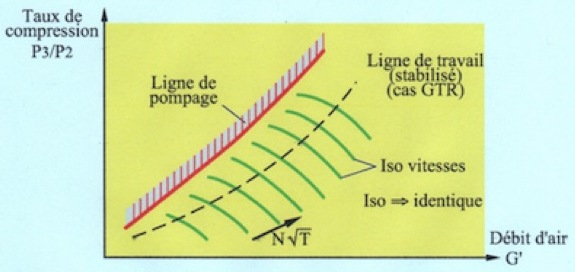 Champ de caractéristiques du compresseur axial représentant la ligne de fonctionnement et de pompage